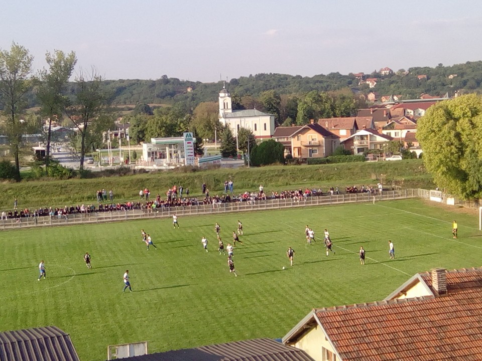 Srpski (latinica): Utakmica Šumadijske lige između Sloge iz Batočine i Lokomotive iz Lapova